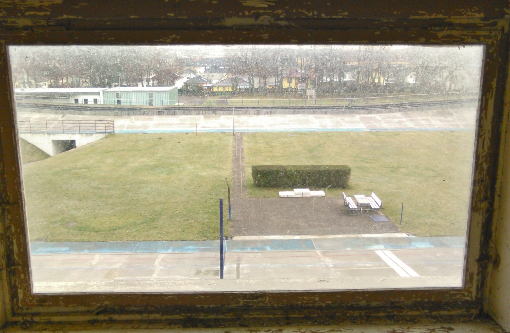 Radrennbahn in Gera-Debschwitz. Blick aus der Kommentatorenkabine. Jahr 2019.